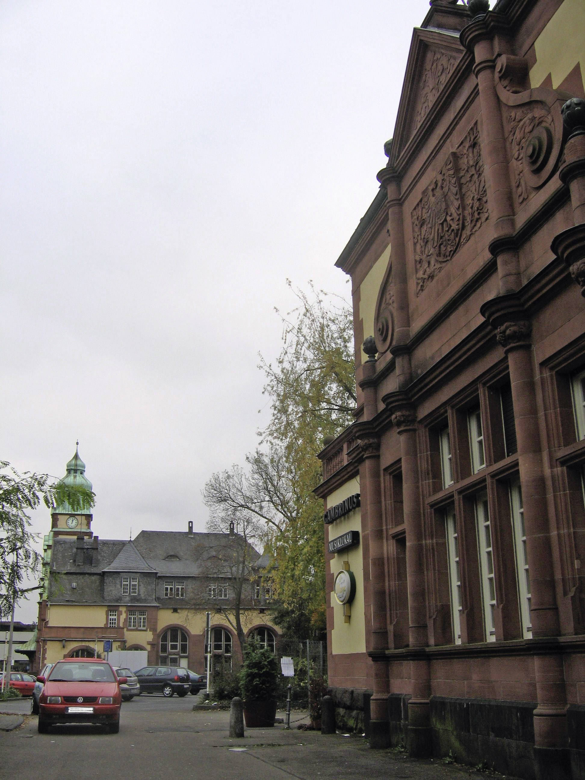 Empfangsgebäude Kaiser Wilhelms II. in Bad Homburg (rechts); Bahnhof Bad Homburg (Hintergrund)